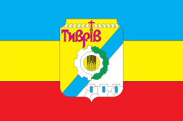 Прапор Тиврівського району